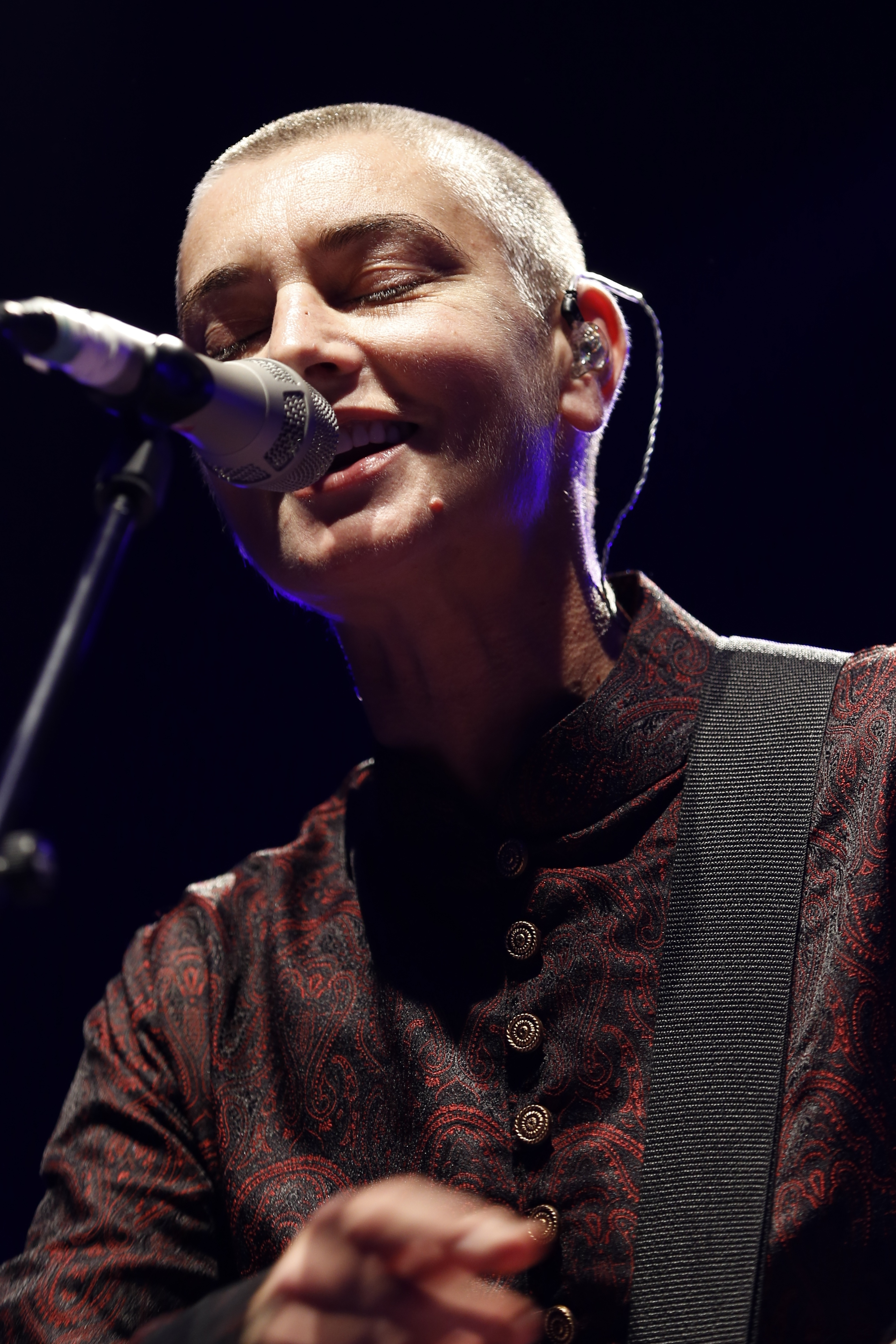 Sinéad O'Connor lors du Festival interceltique de Lorient, le 10 août 2013.